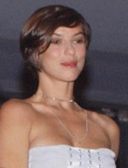 Maria Paula Fidalgo, modelo, apresentadora de televisão e humorista brasileira